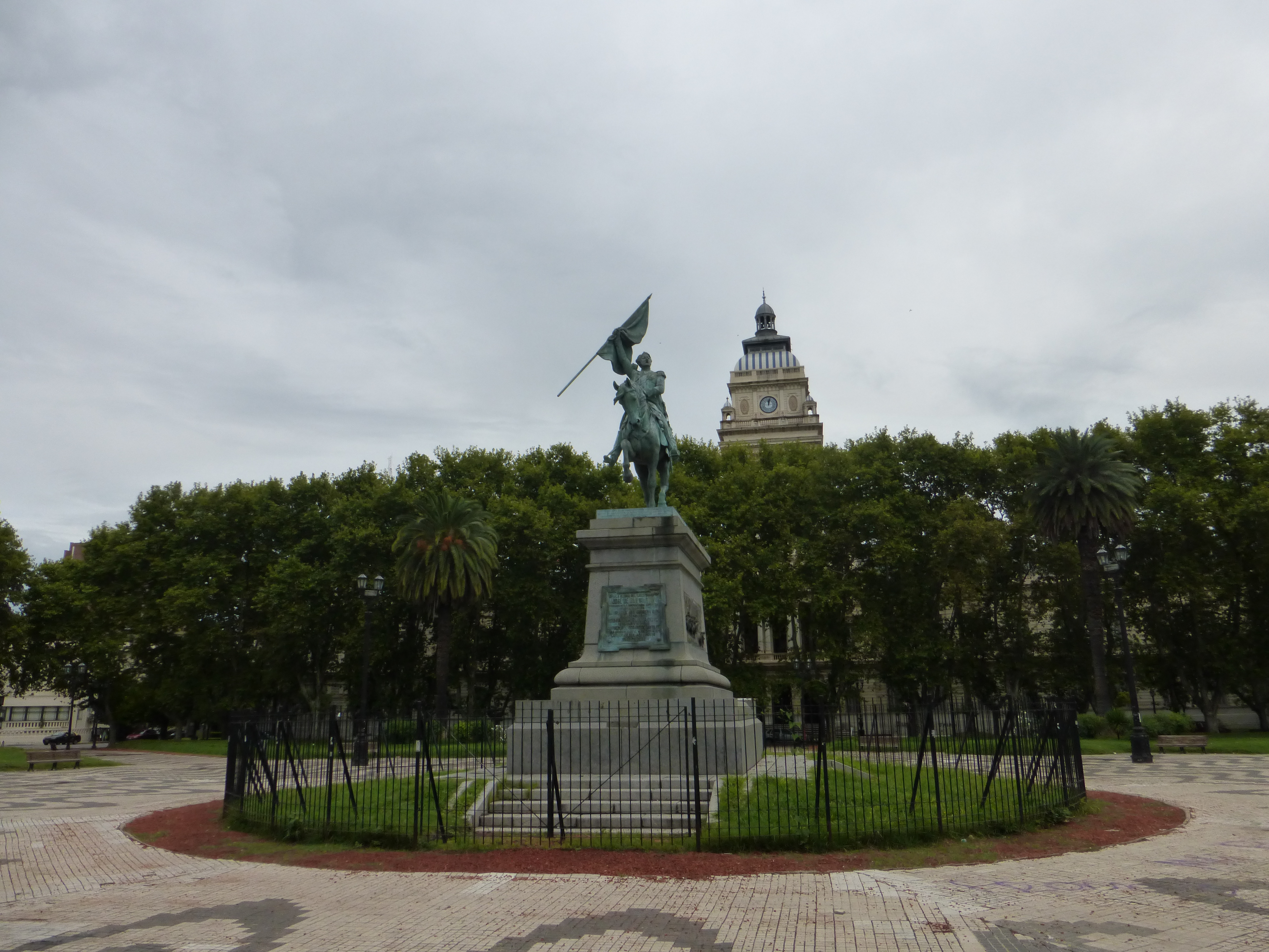 Monumento al General San Martín, construido en 1912 y emplazado en la plaza homónima de la ciudad de Rosario, Argentina.